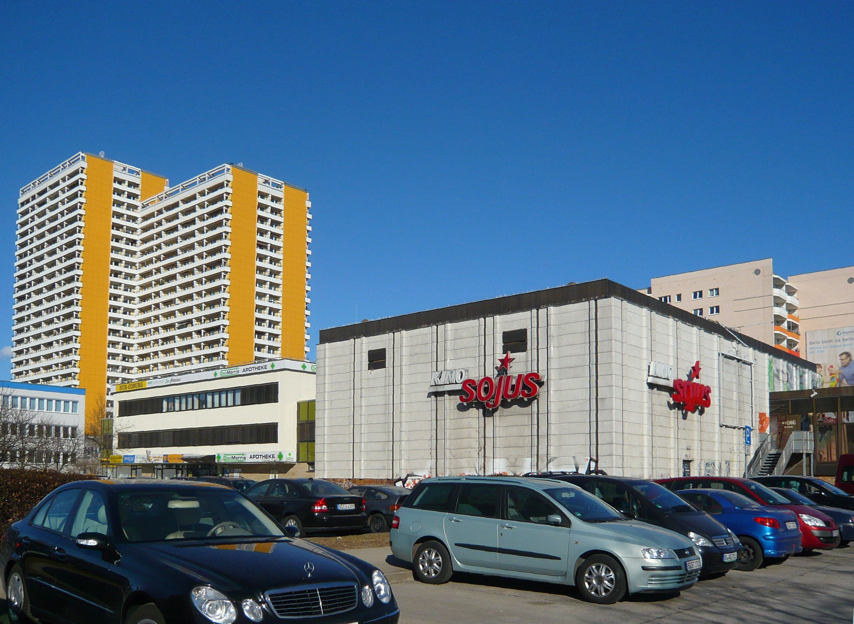 Ortsteil Berlin-Marzahn: Helene-Weigel-Platz, Kino "Sojus"